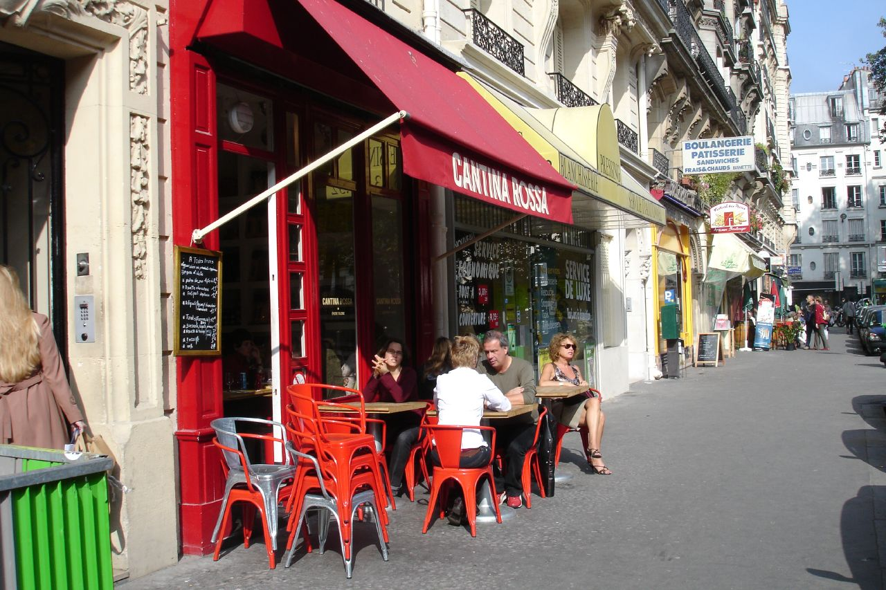 Sidewalk restaurat Cantina Rossa, near faubourg Saint Antoine, 3 Rue Antoine-Vollon, Paris, 12e